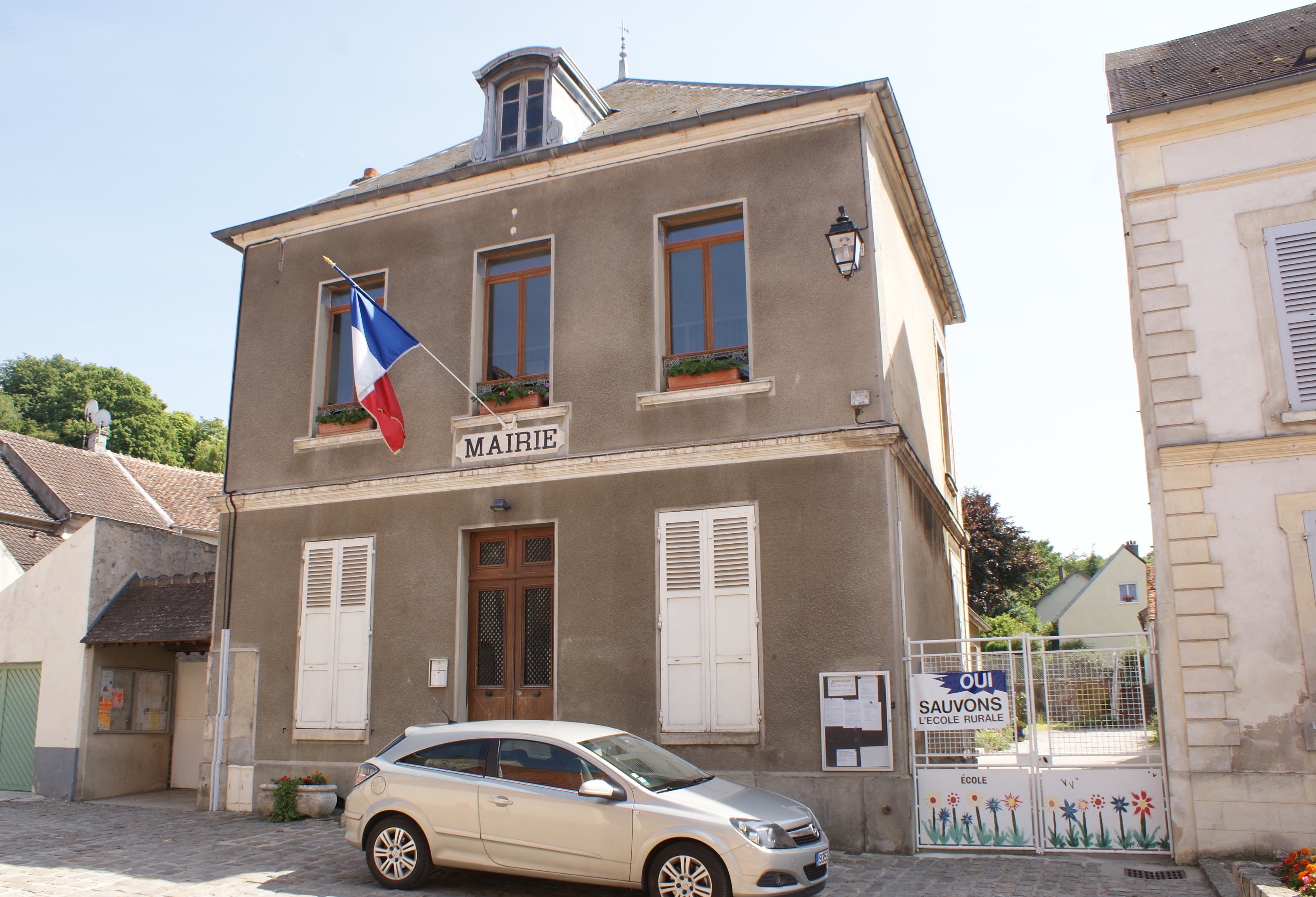 Mairie de Gandelu et école primaire de la commune